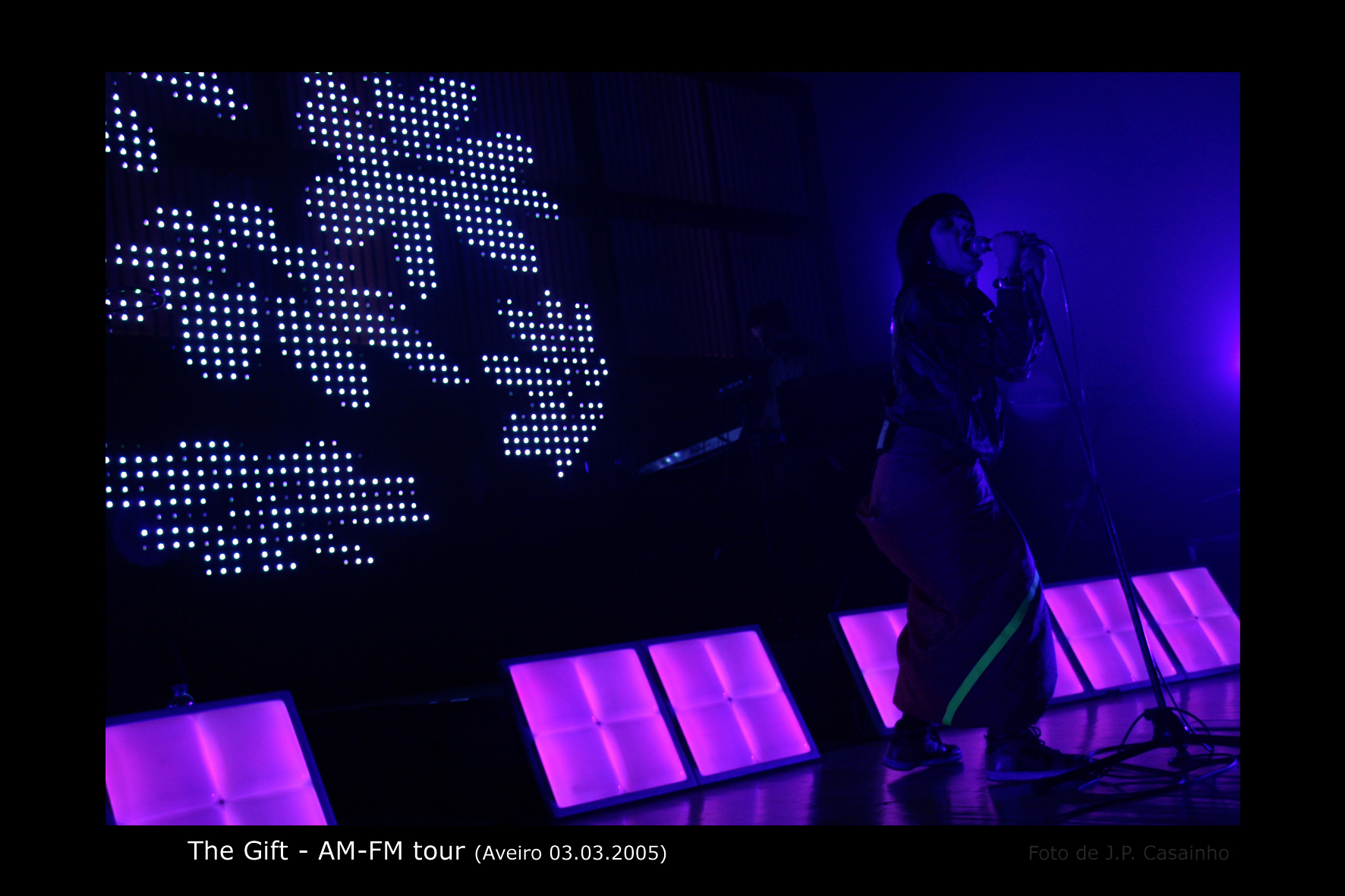 The Gift - AM-FM tour Portugal - Aveiro (03.03.2005) foto de J.P.Casainho